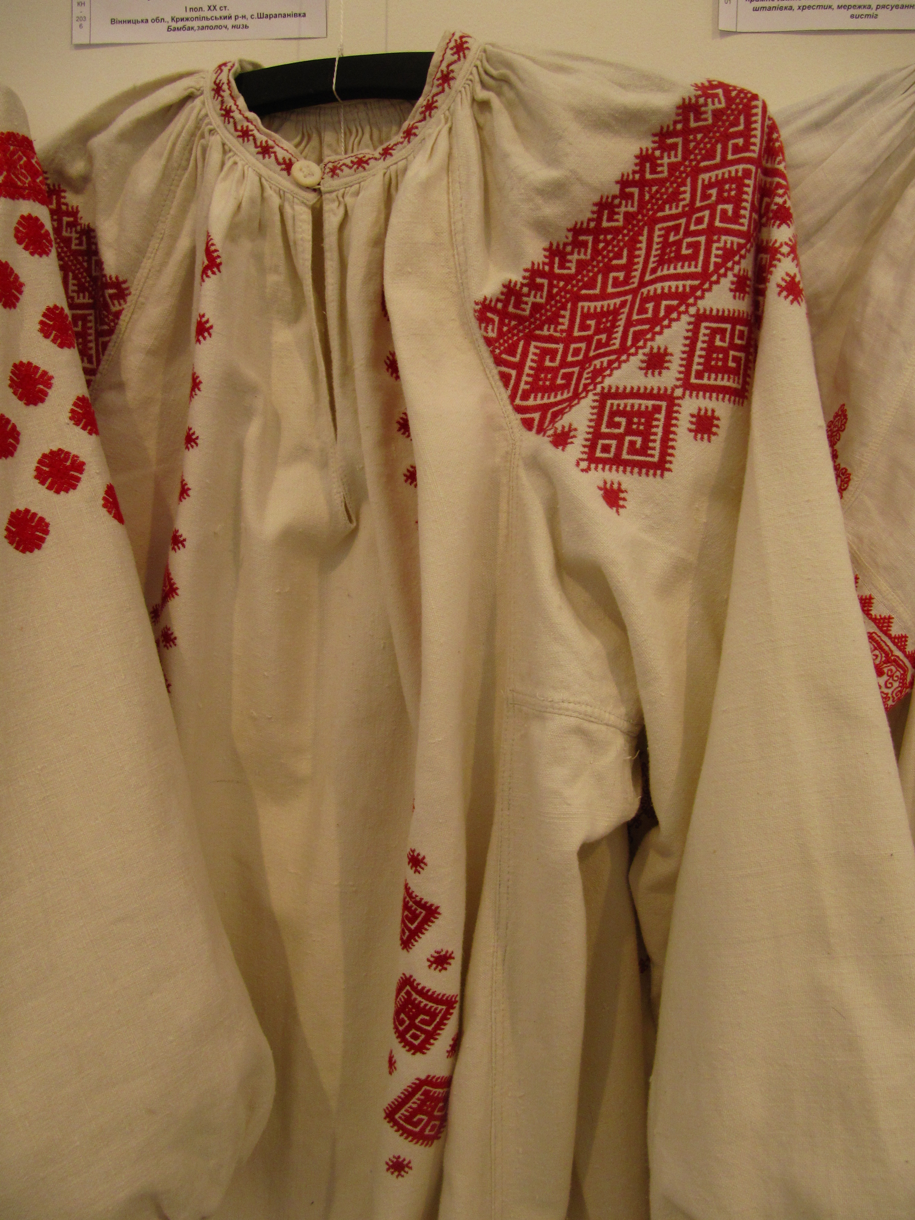 Жіноча сорочка до підточки. 1 половина 20 ст. Вінницька обл. Крижопільський р. с. Шарапанівка. Виставка в музеї Івана Гончара (Київ).